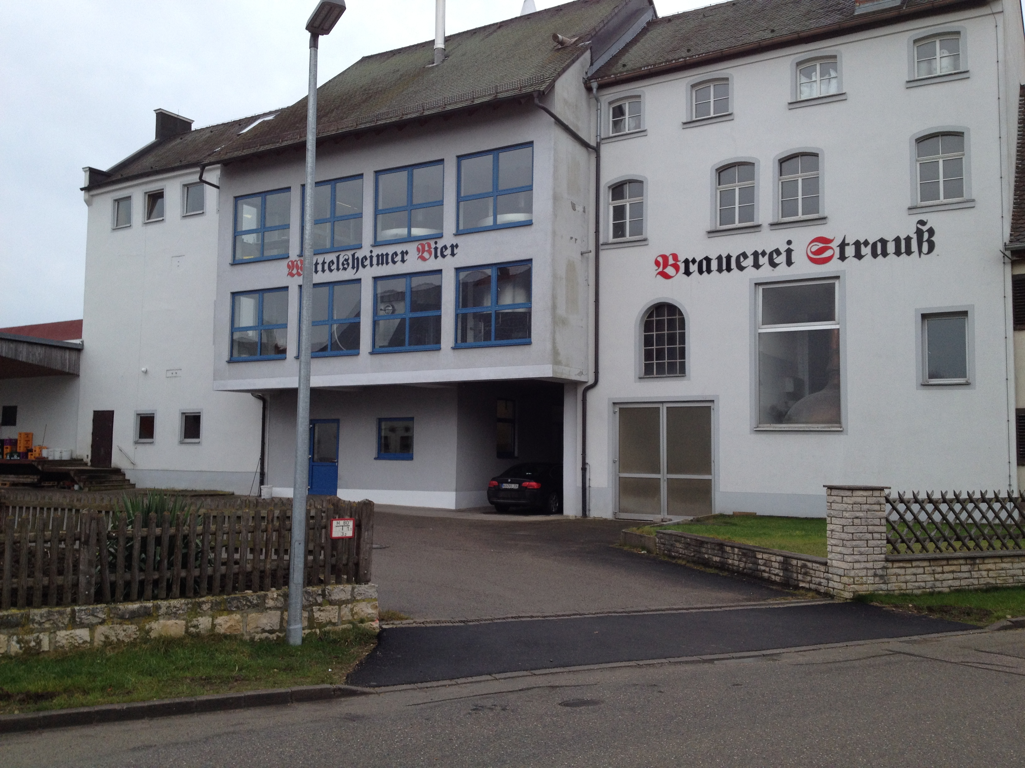 Brauereigebäude Strauß Wettelsheim